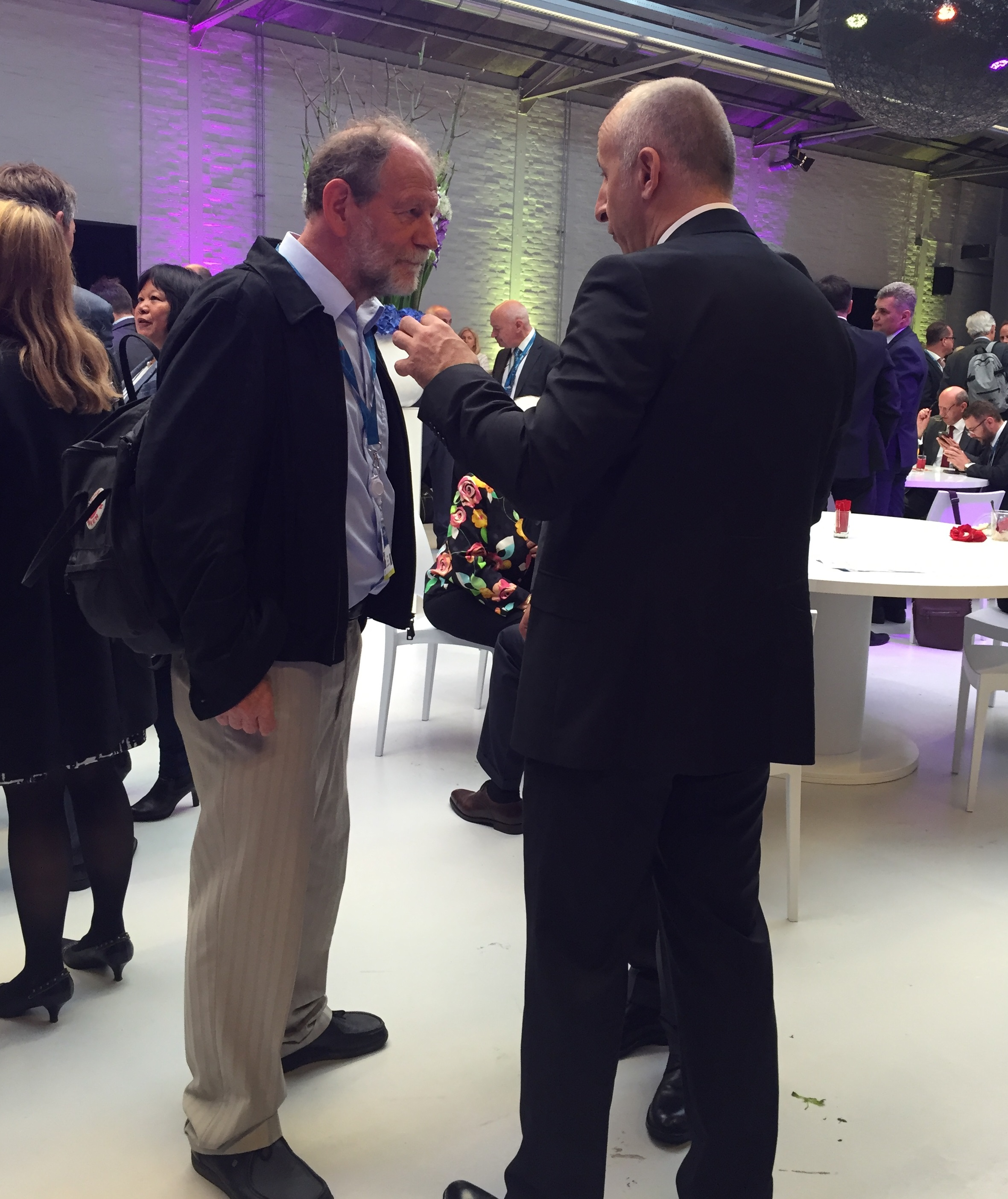 cu Michael Cramer, președintele comisiei TRAN a Parlamentului European, după intervenția comună pentru susținerea căii ferate